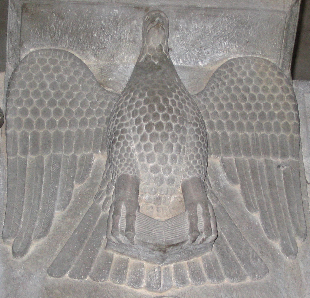 Autore Giorces. Almenno San Salvatore, particolare dell'ambone della Pieve.